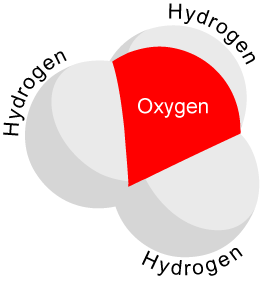 Hydronium